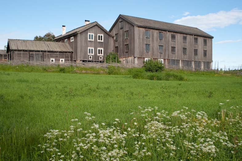 Hudiksvall Hillsta 6:1. Gården består av manbyggnad, sängstugebyggning och bryggstuga ihopbyggda med ladugård, samt en stor loge. De bildar en tät fyrkant runt ett gårdstun. Utanför gårdsfyrkanten ligger några mindre uthus; småfähus, härbre, vagnslider, loge, sädesbastu och vedbod. Hälsingegårdar. Motiv: Hudiksvall Hillsta 6:1 Nyckelord: Byggnadsminnen, Riksintressen Kategori: Hembygdsgård, Jordbruksegnahem Hudiksvall Hillsta 6:1. Gården består av manbyggnad, sängstugebyggning och bryggstuga ihopbyggda med ladugård, samt en stor loge. De bildar en tät fyrkant runt ett gårdstun. Utanför gårdsfyrkanten ligger några mindre uthus; småfähus, härbre, vagnslider, loge, sädesbastu och vedbod. Hälsingegårdar. Hudiksvall Hillsta 6:1.